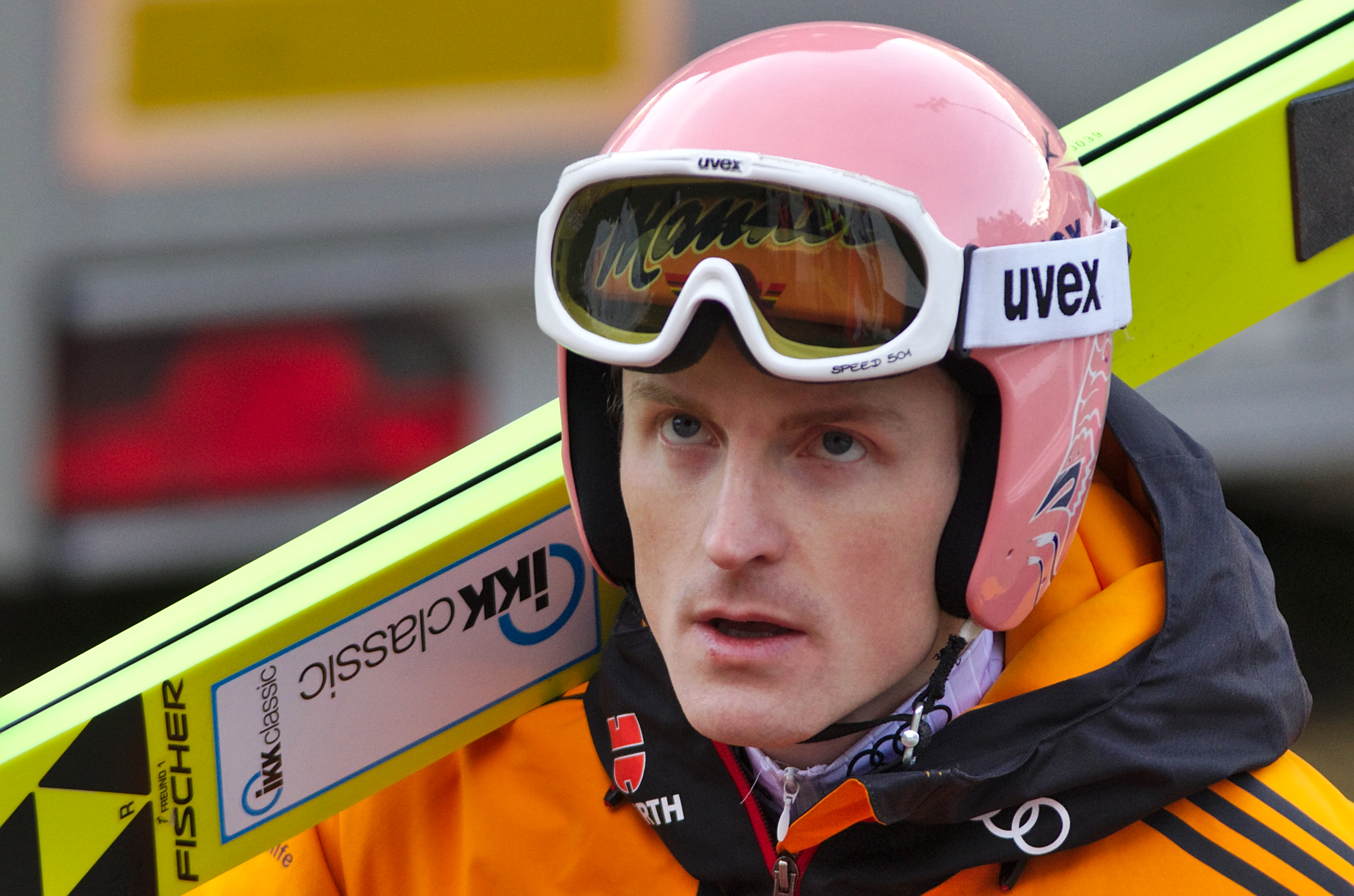 FIS Ski Jumping World Cup 2014 - Engelberg - 20141221 - Severin Freund